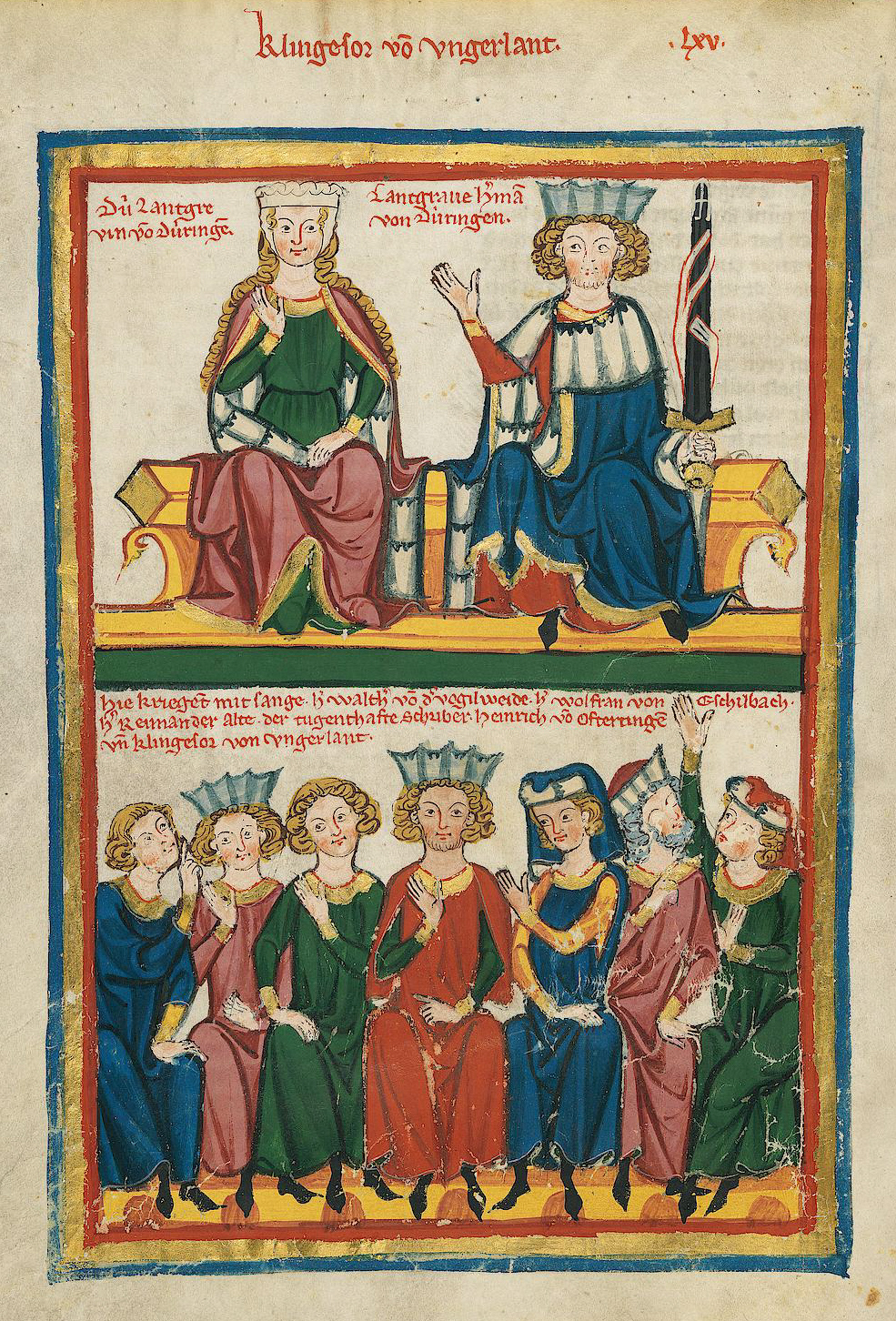 Codex Manesse, UB Heidelberg, Cod. Pal. germ. 848, fol. 219v, Sängerkrieg auf der Wartburg (unter dem fiktiven Autorennamen Klingsor von Ungarland)